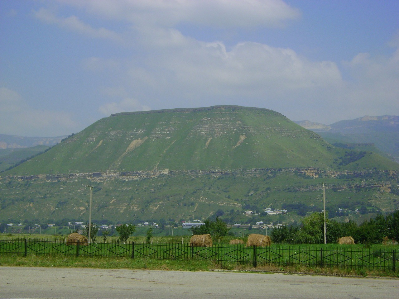 Вид на аул Хамара